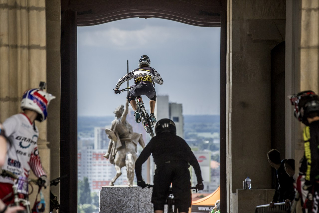 Стартовый трамплин